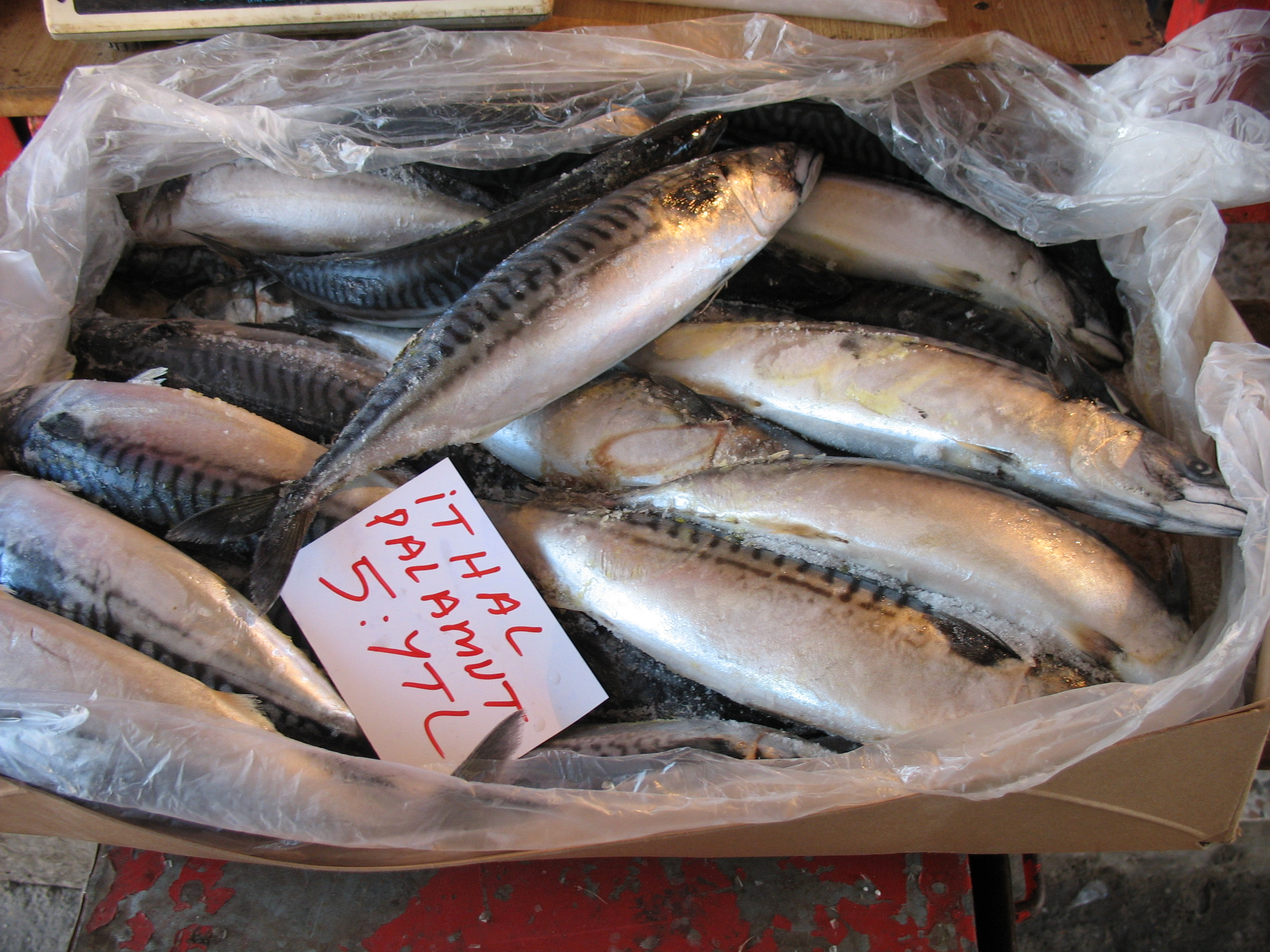 ithal palamut, pazarda